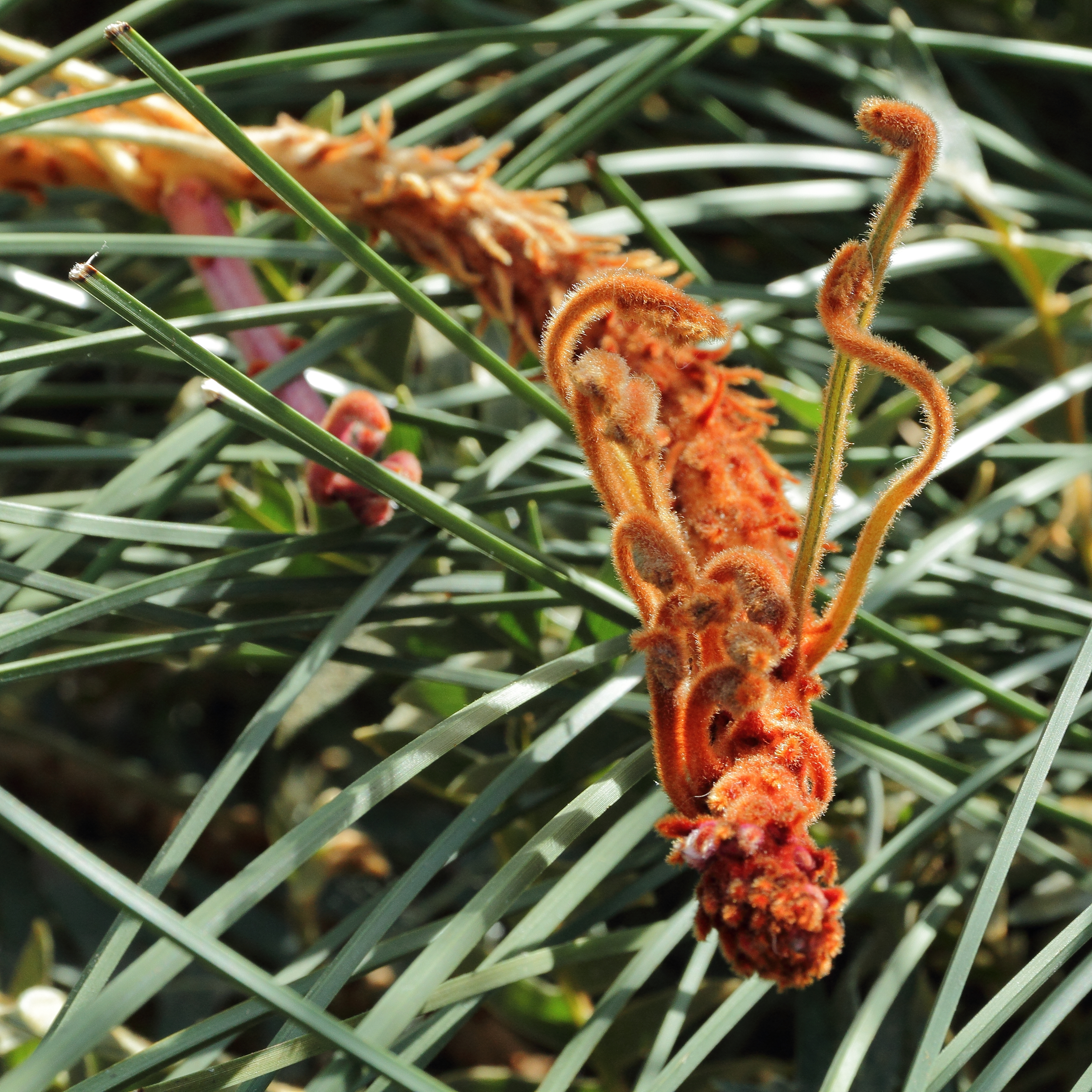 Banksia blechnifolia i Bergianska trädgården